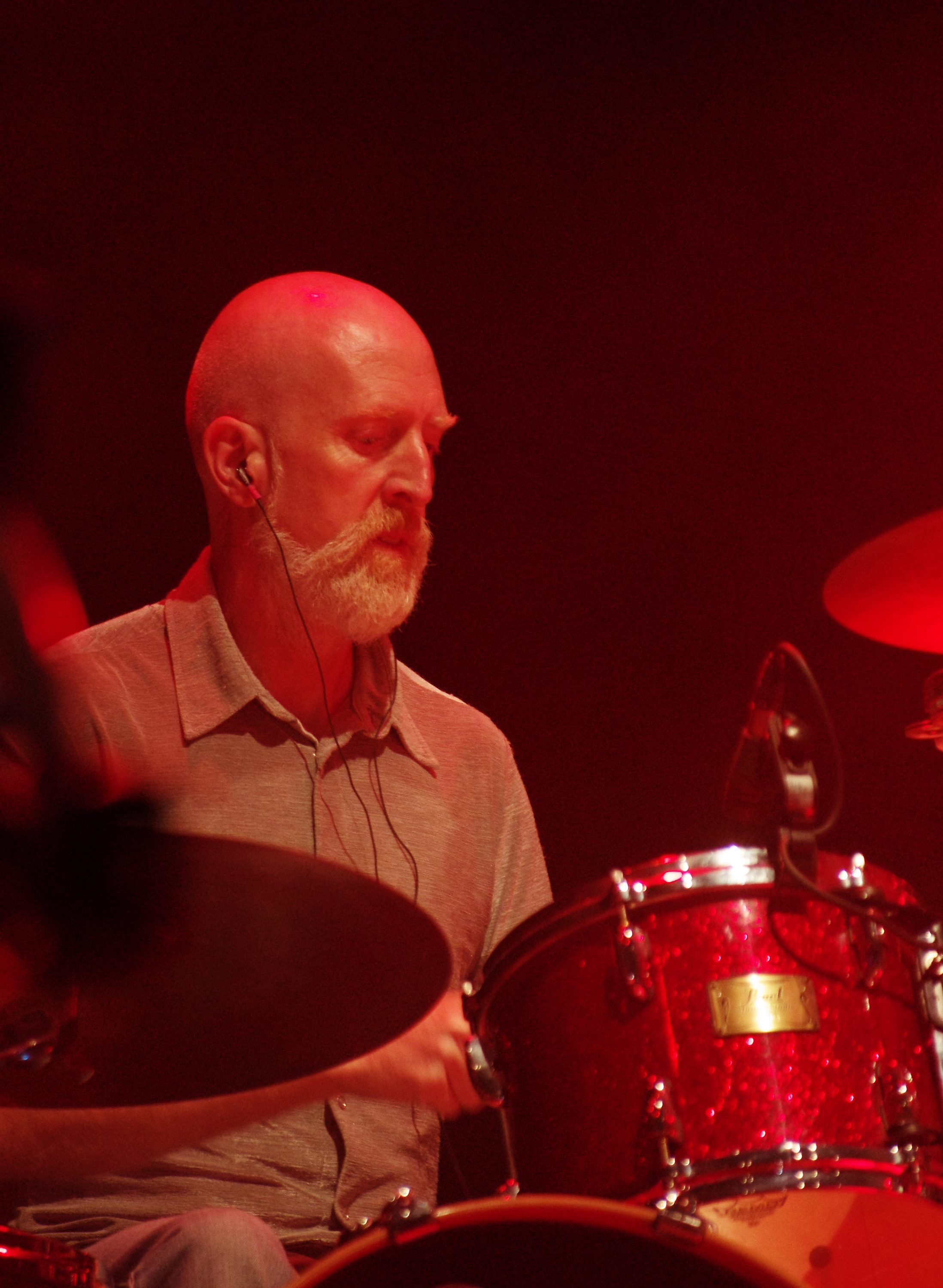 James (band) auf dem Haldern Pop Festival 2013. Hauptbühne. Besetzung: Tim Booth (Gesang) Jim Glennie (Bass) Larry Gott (Gitarre) Saul Davies (Gitarre, Violine, Percussion) Mark Hunter (Keyboards) Dave Baynton-Power (Schlagzeug) Andy Diagram (Trompete, Percussion)